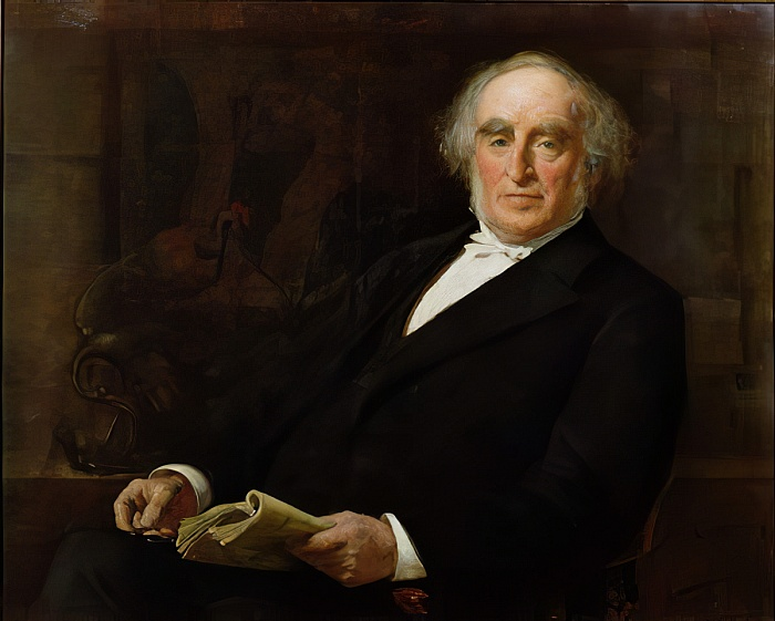 Джеймс Элдер Кристи, портрет профессора Легга